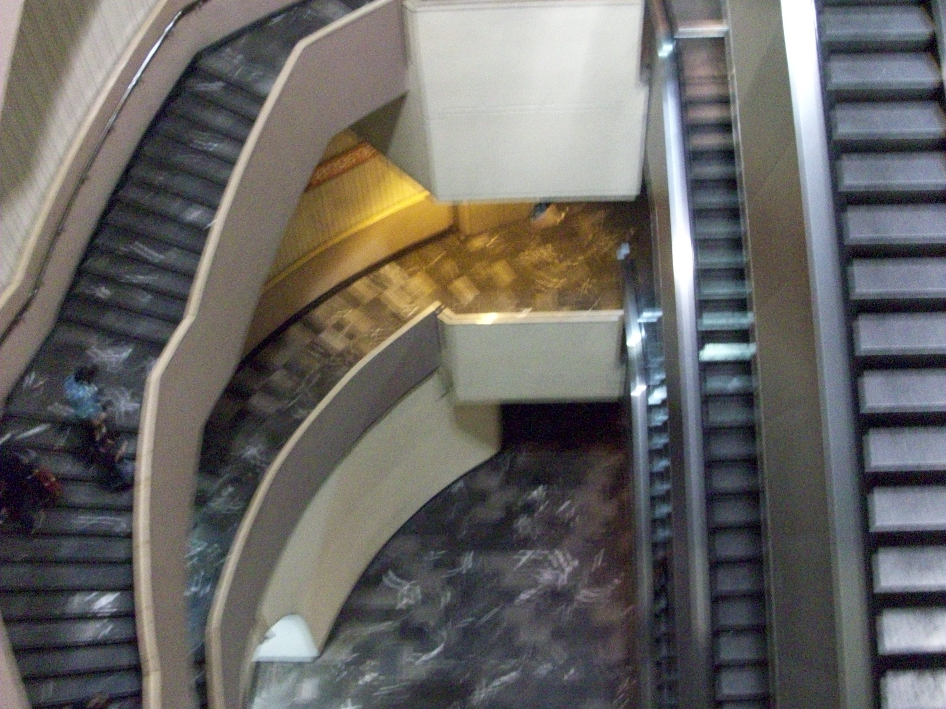 Escaleras electricas de la estacion camarones